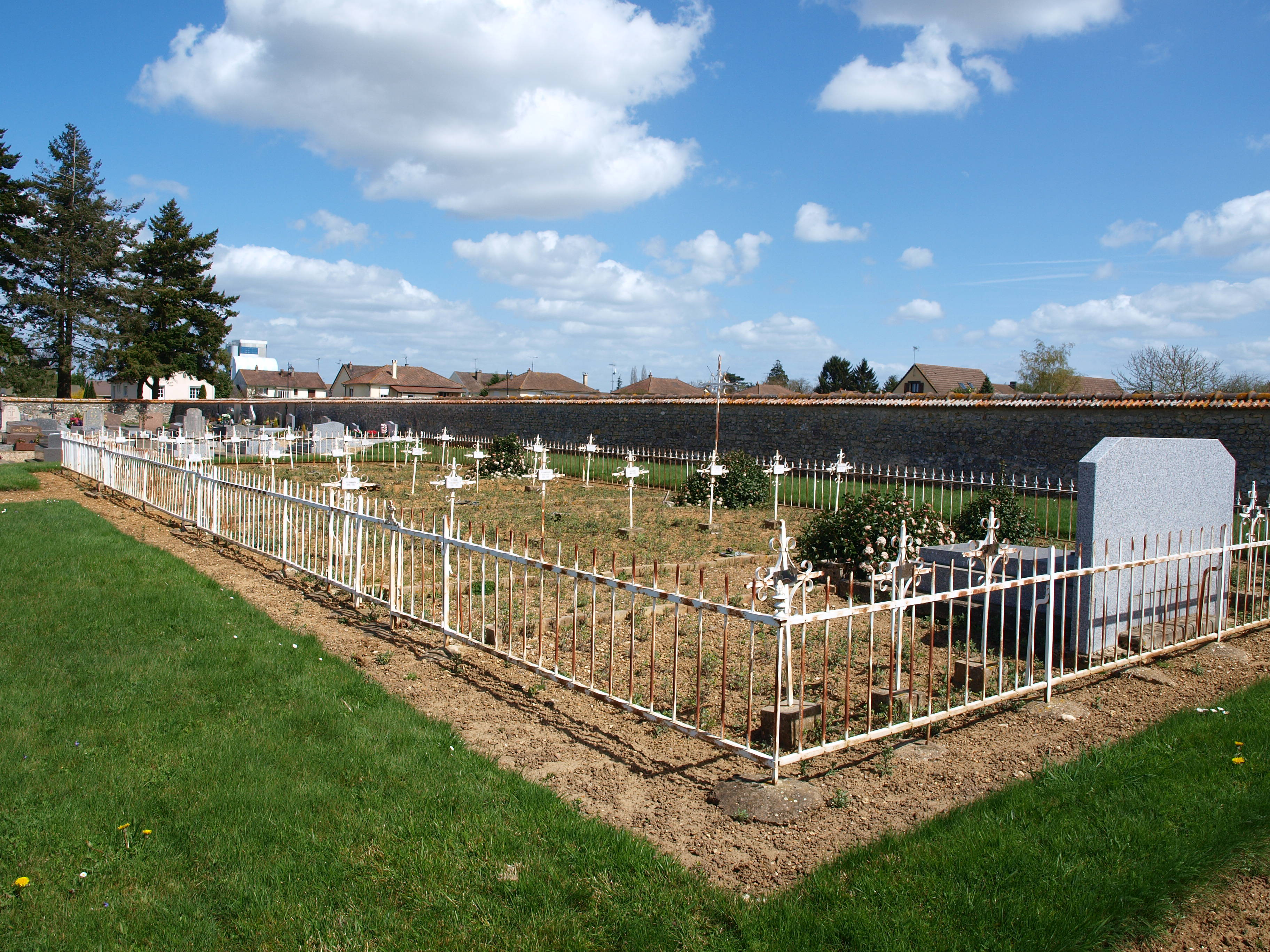 Sainville (Eure-et-Loir, France) ; au cimetière, le carré des religieuses du couvent de la Congrégation des Sœurs de Charité Dominicaine de la Présentation.